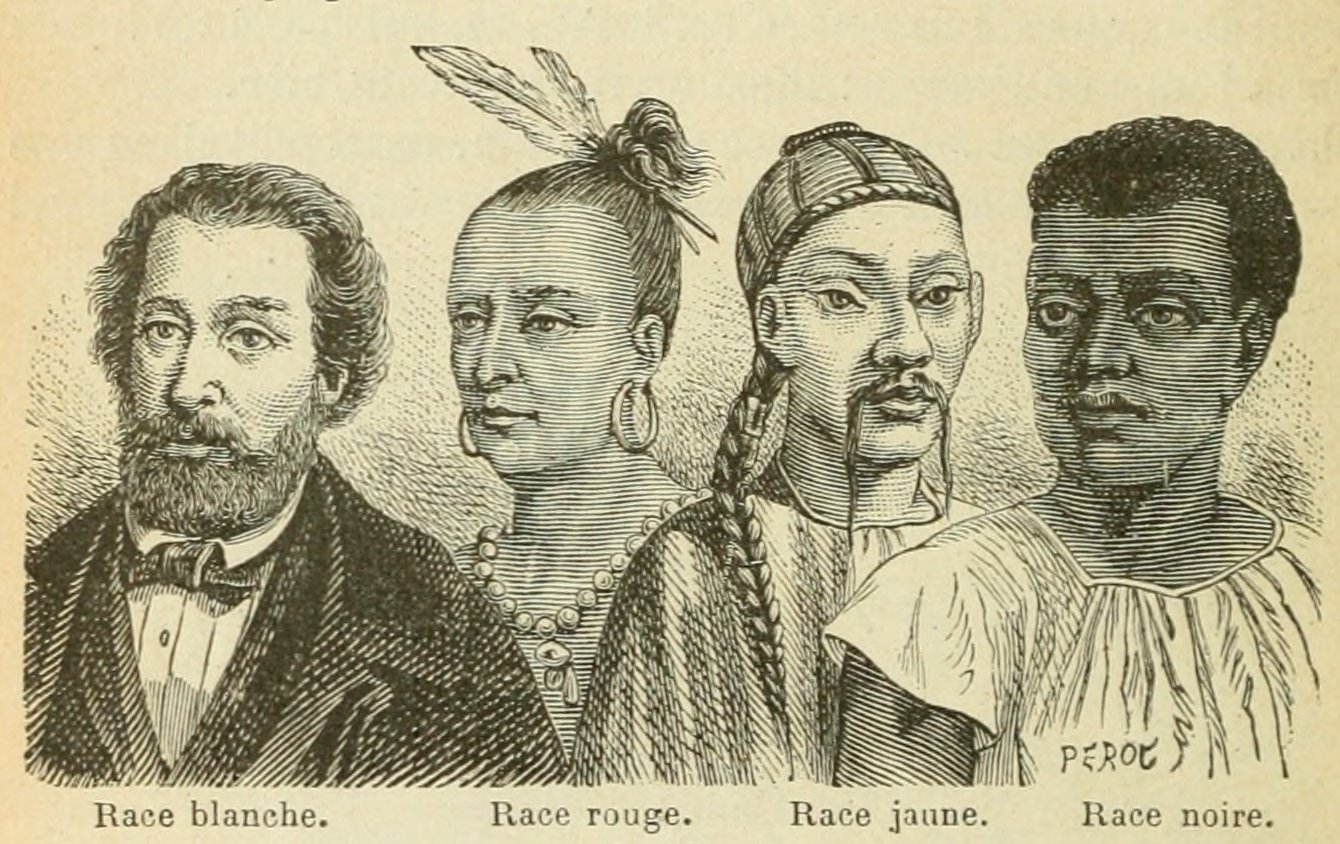 Le tour de la France par deux enfants, par George Bruno, manuel scolaire, édition de 1904.